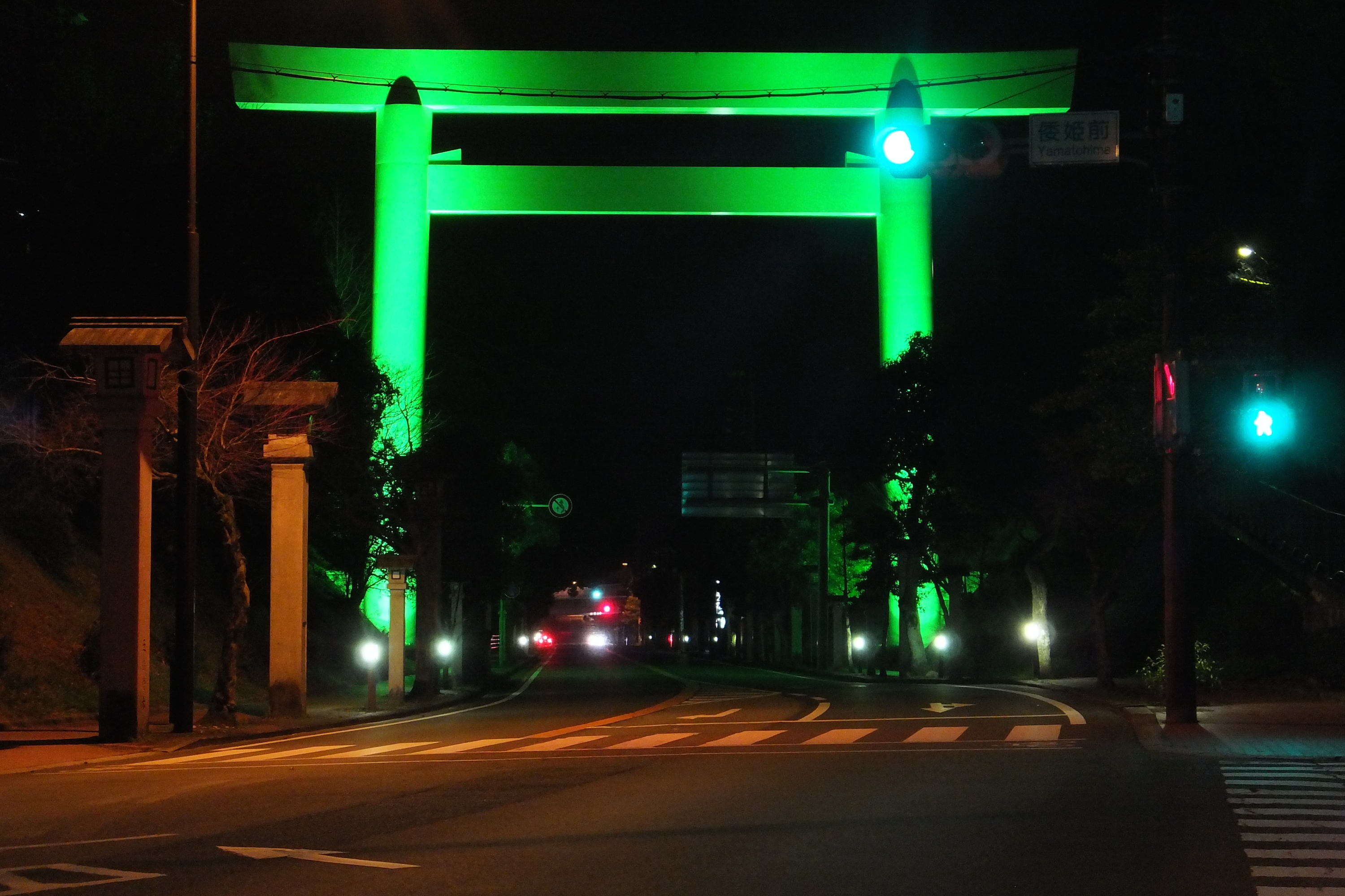 緑色にライトアップされた三重県伊勢市・御幸道路（三重県道37号線）上にある鳥居